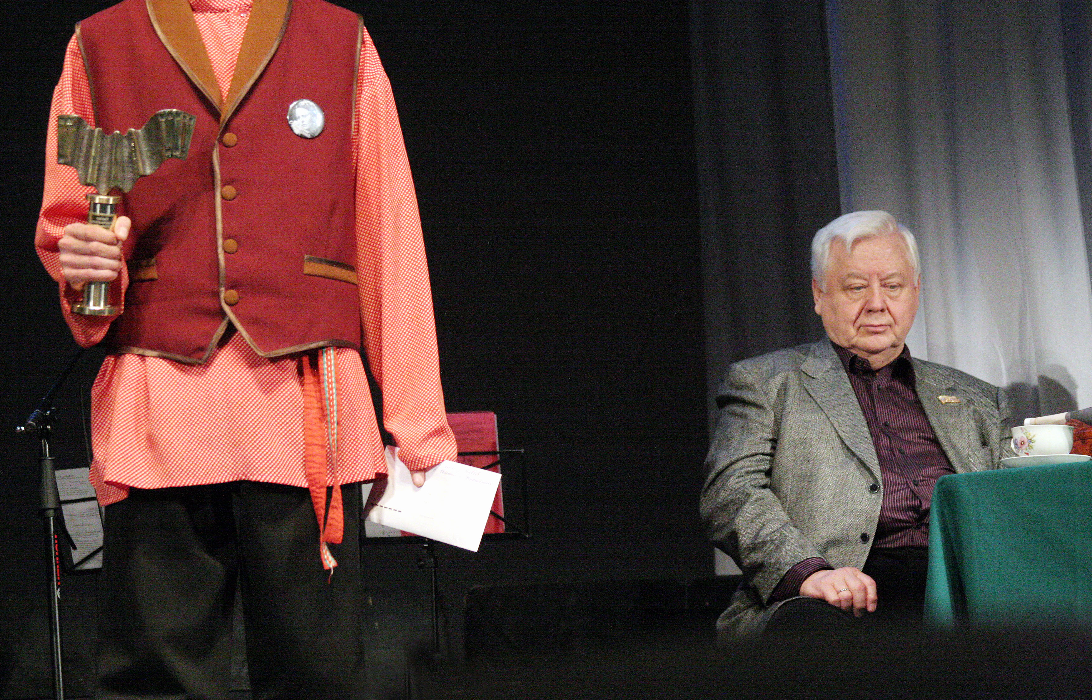 Президент "Саратовских страданий" Олег Табаков на церемонии закрытия пятого фестиваля.